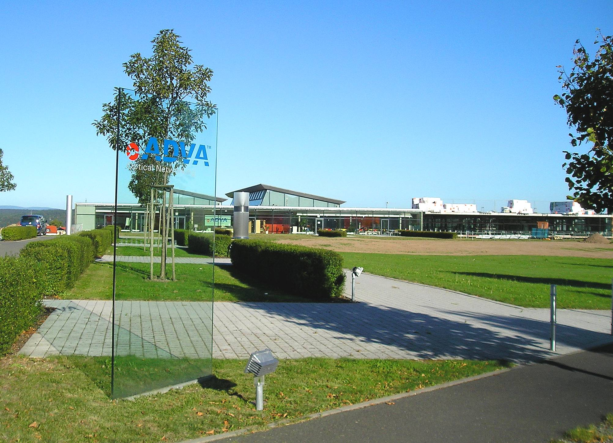 Der Haupteingang der Firma ADVA Optical Networking AG in Meiningen. Aufnahmezeit: August 2006